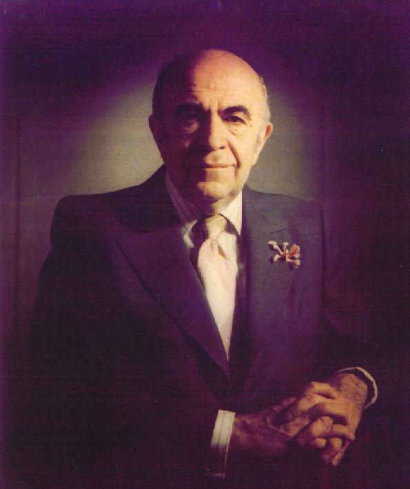 Amir Abbas Hoveida (1919 - 1979), former iranian prime minister.